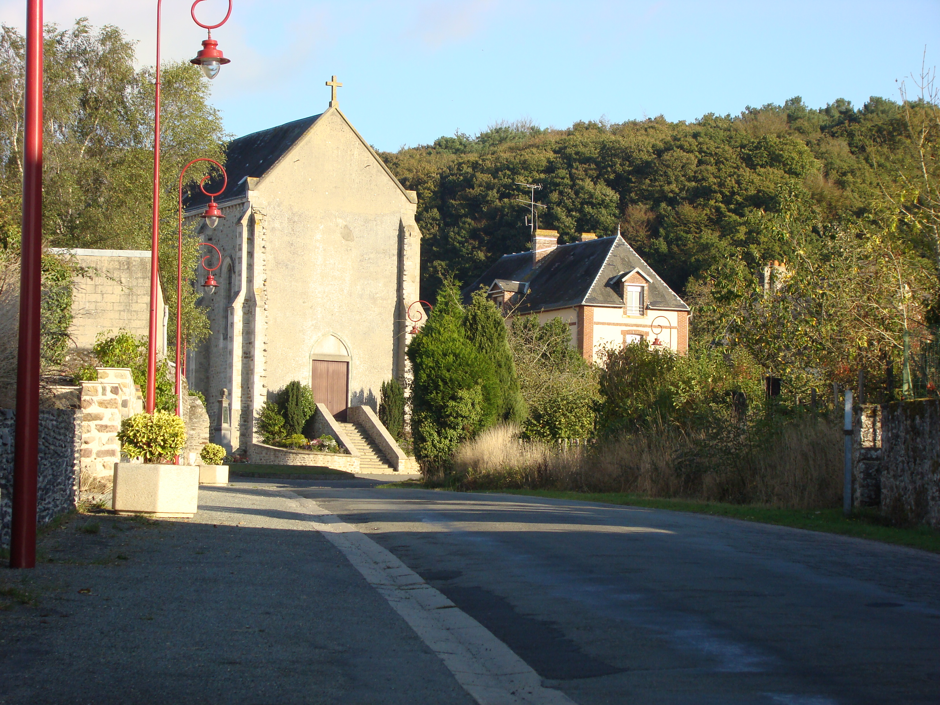 Église Saint-Sulpice Villepail